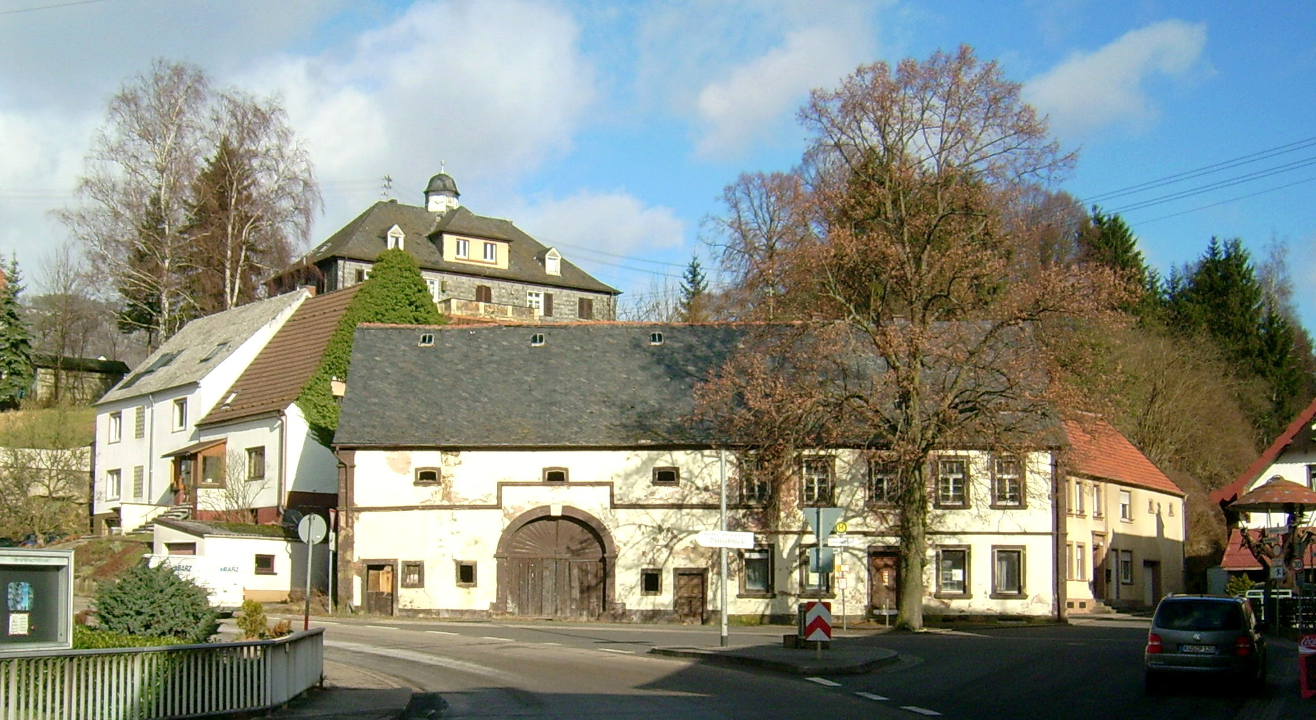 Ortsansicht